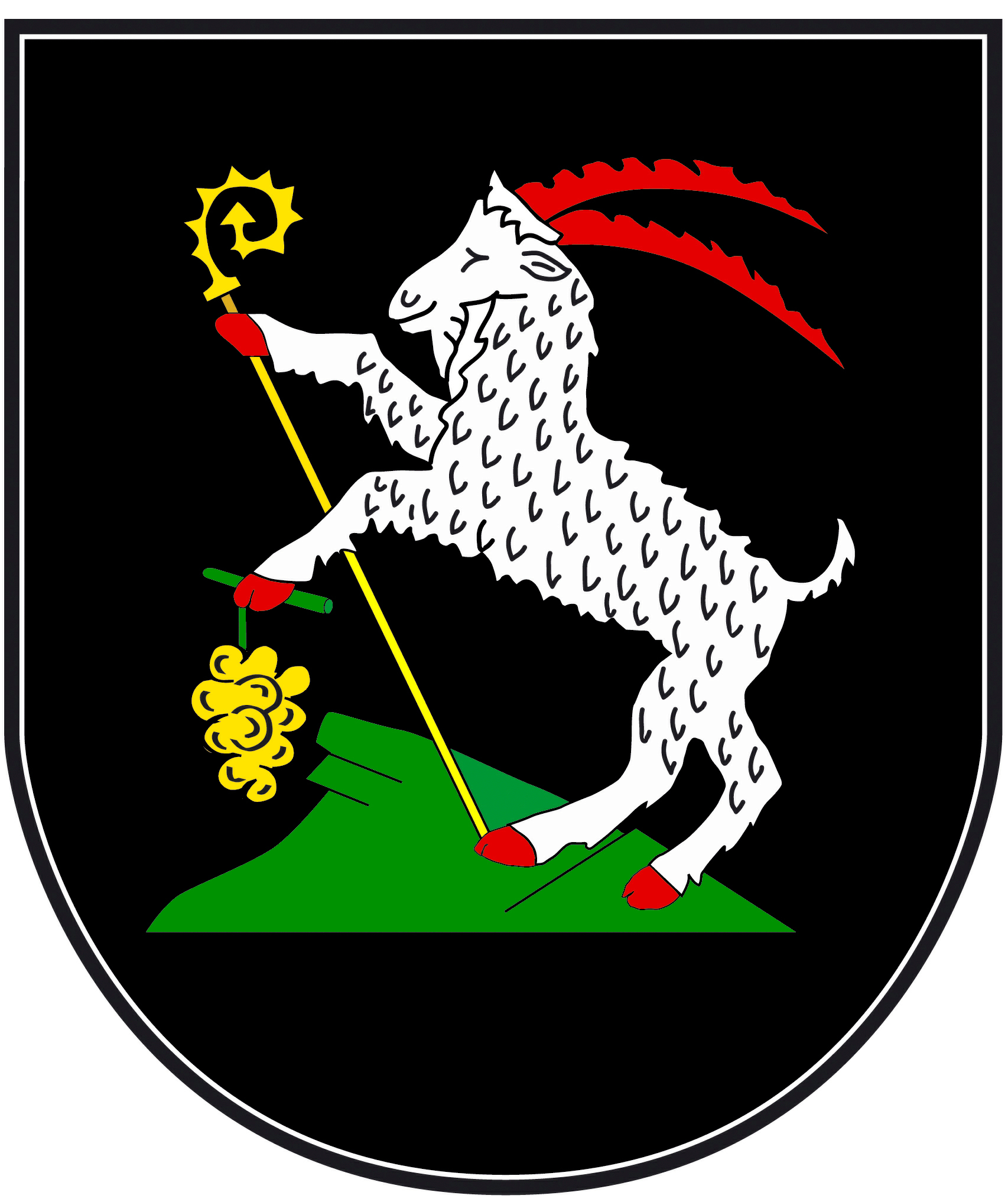 Wappen der Ortsgemeinde Ockfen